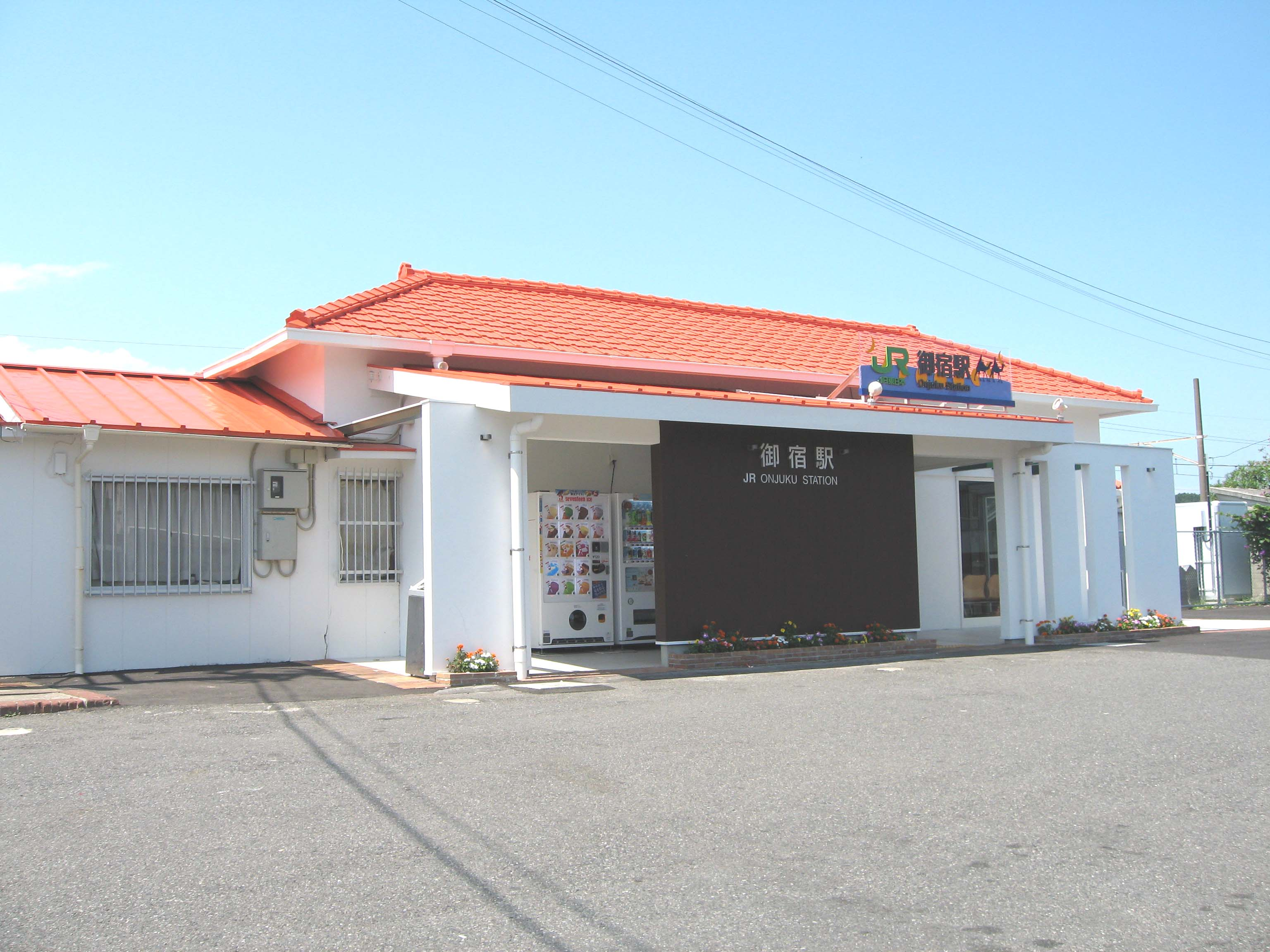 Onjuku station, Sotobo Line, Chiba, Japan, 御宿駅駅舎